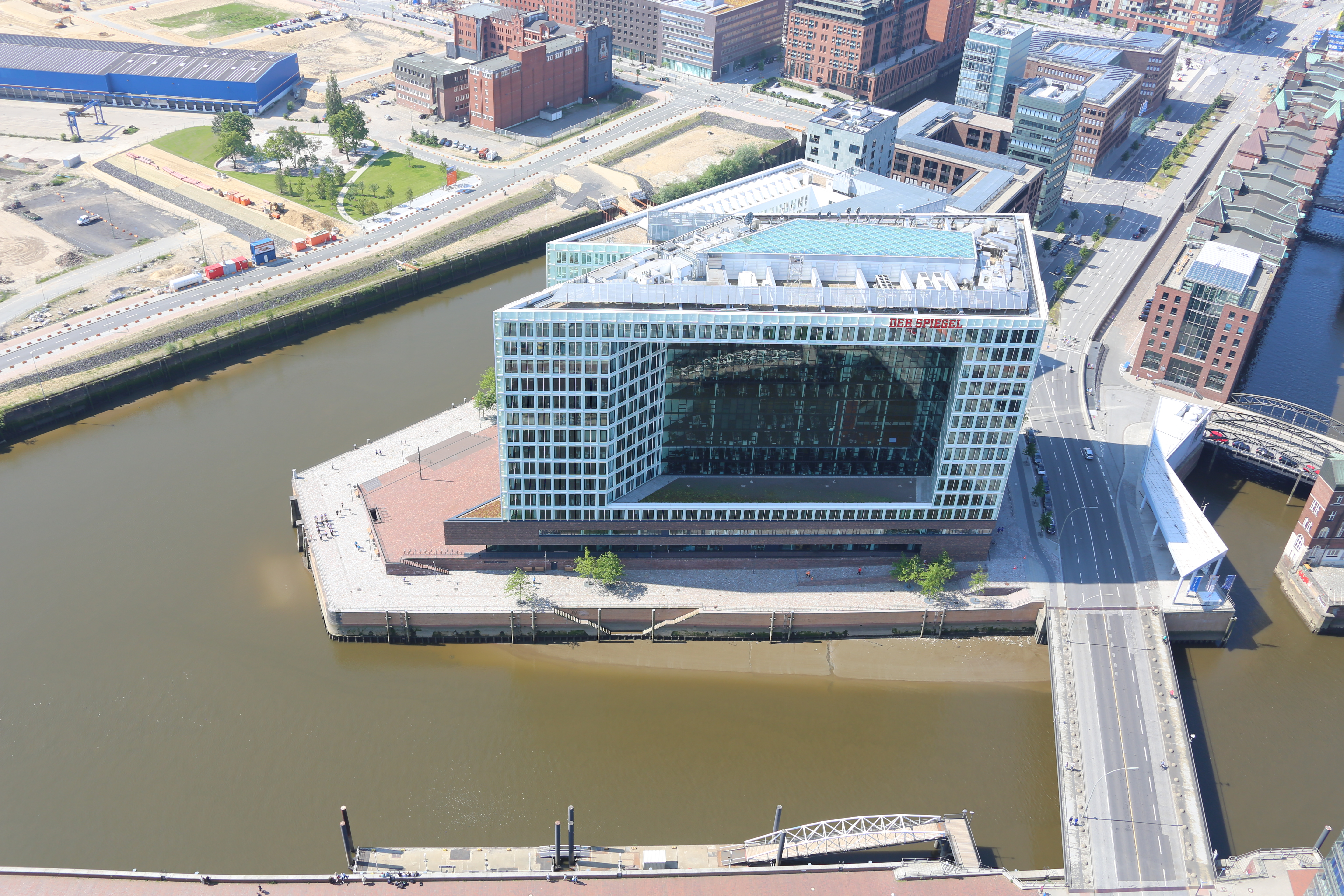 Projekt Heißluftballon, Fahrt über Hamburg und Umgebung. This photo was taken by Alchemist-hp. If you use one of my photos, an email (account needed) or a message or direct to: my email account would be greatly appreciated. Please note the license terms. Other licensing terms can get discussed, too. This file is copyrighted and has been released under a license which is incompatible with Facebook's licensing terms. It is not permitted to upload this file to Facebook.